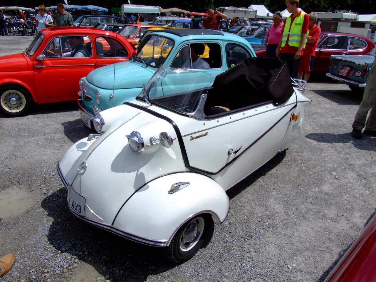 Messerschmitt KR 201 Roadster Kabinenroller